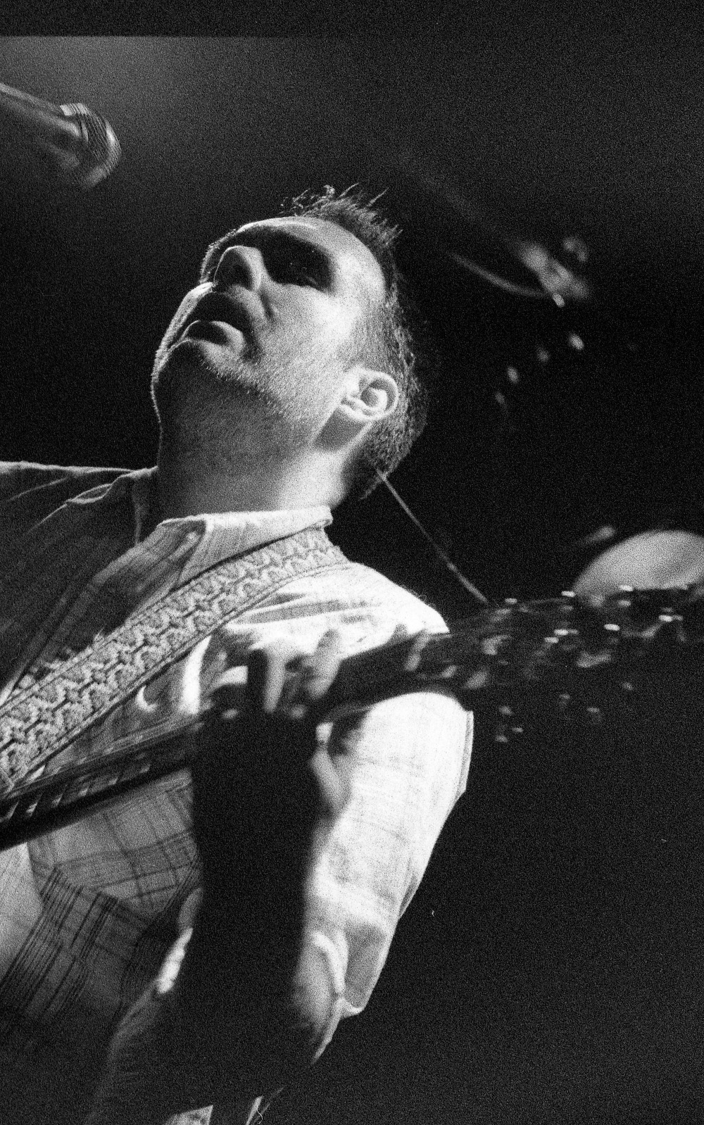 Mike Moya from HṚṢṬA.